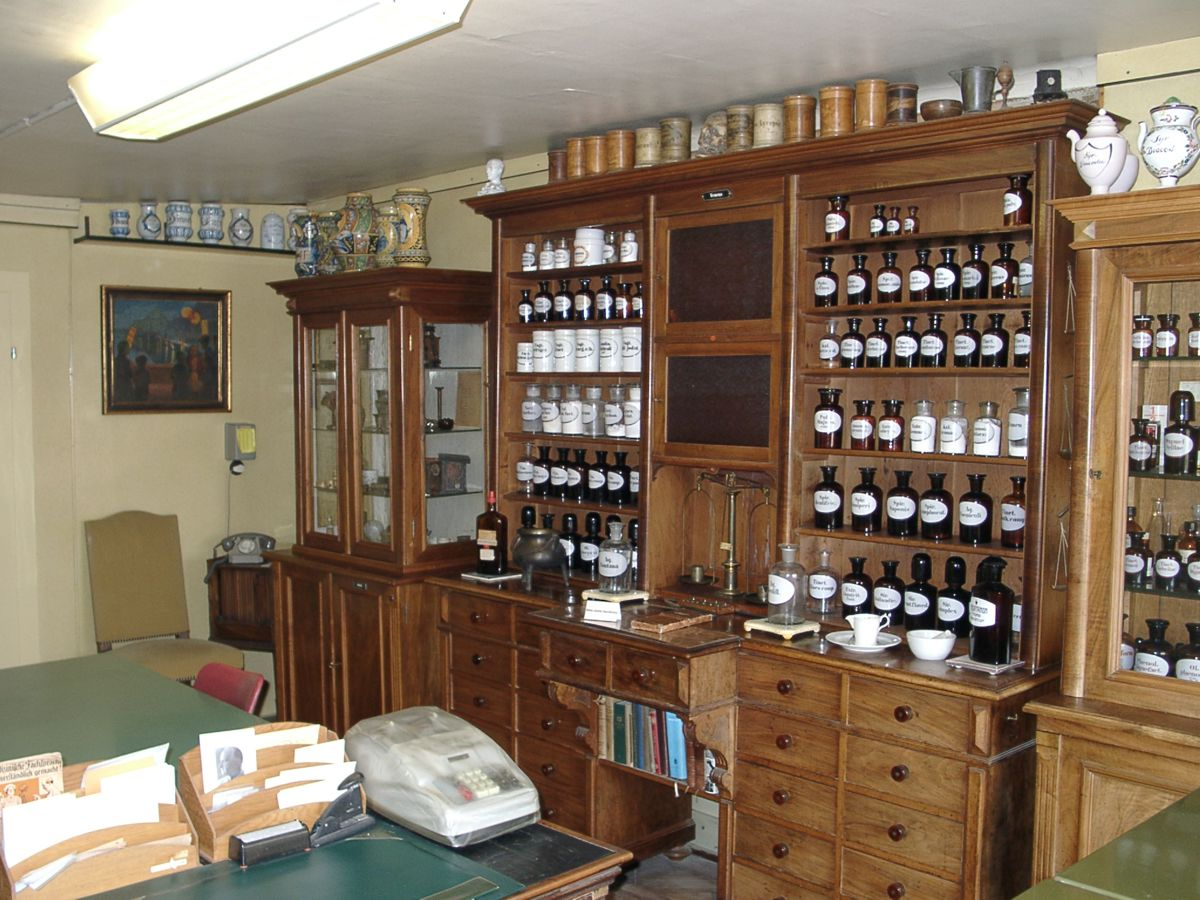 Sprechzimmer im Museum Haus zum Dolder, Beromünster/Luzern/Schweiz